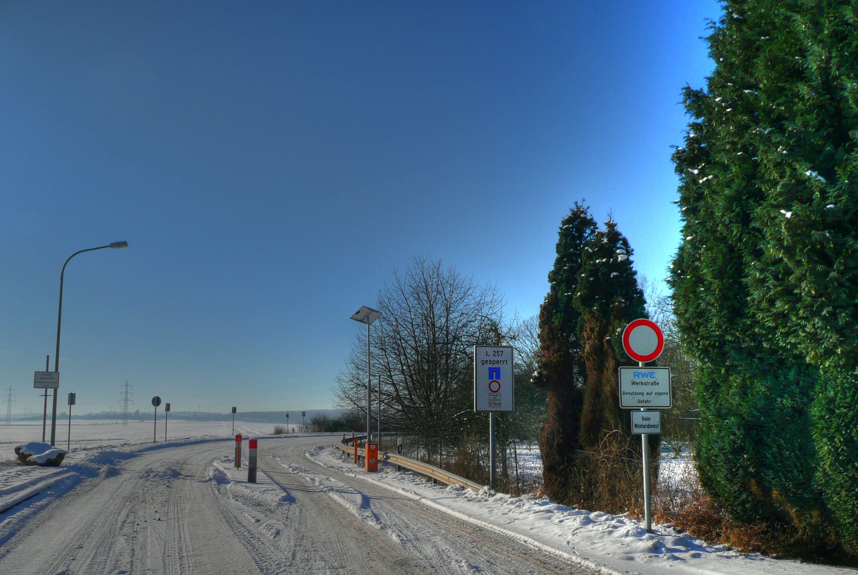 Gesperrter Ortsausgang von Pier)